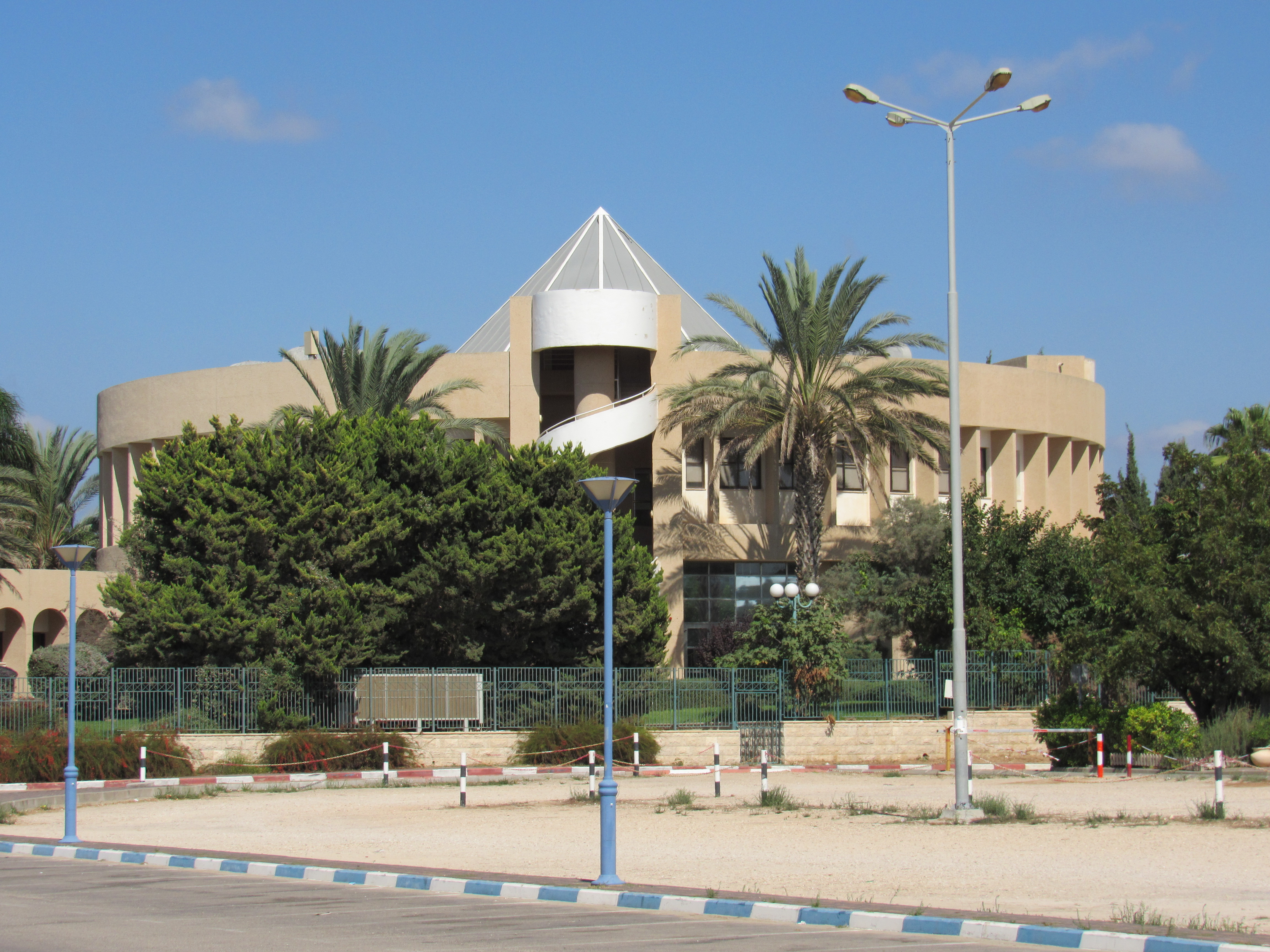 Acre